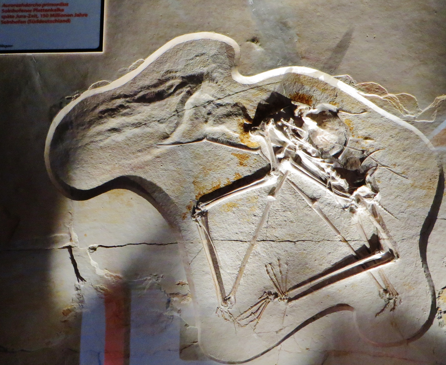 Fossil of Aurorazhdarcho- Took the picture at Natural History Museum, Basel